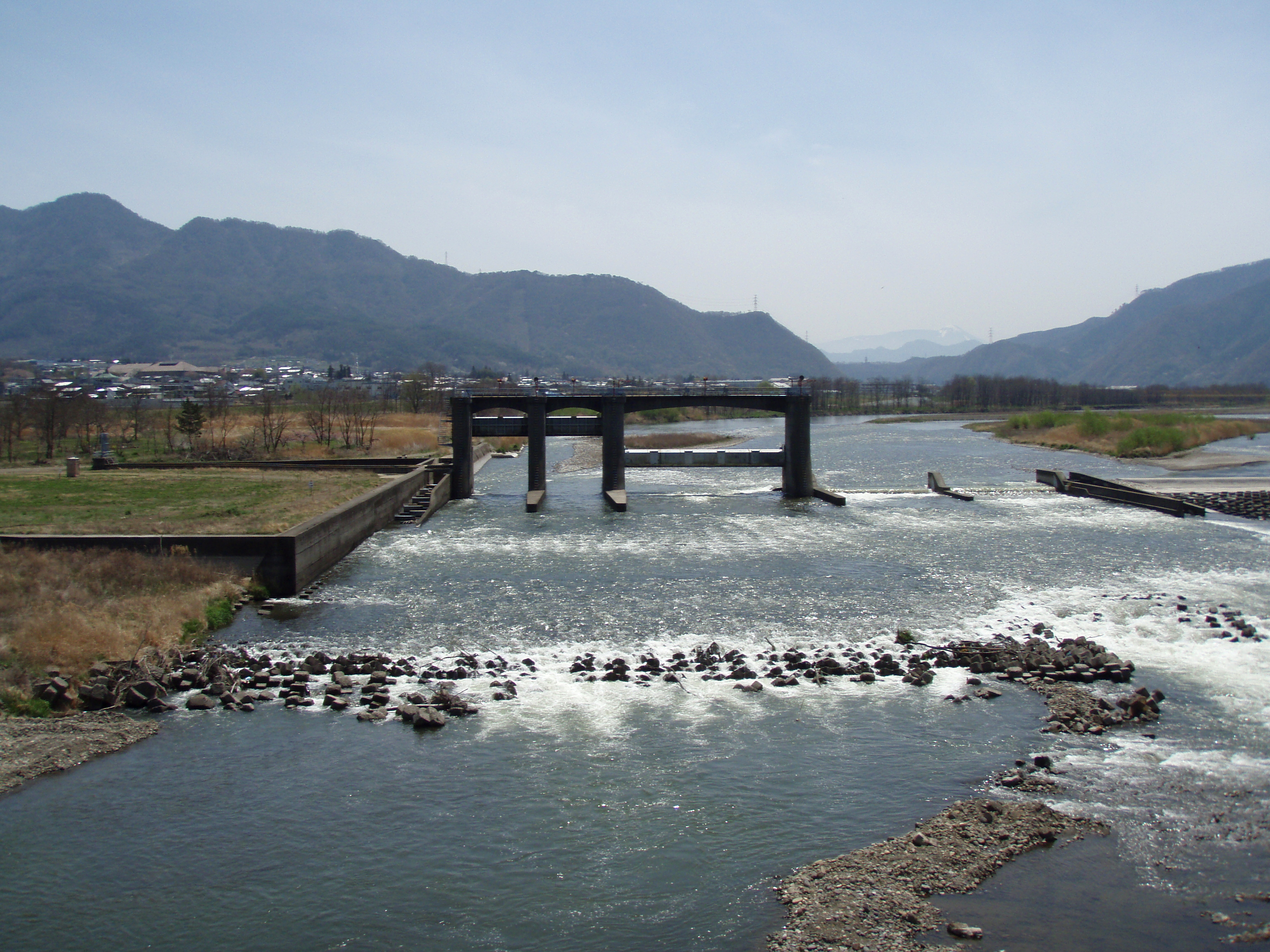 下流の坂城大橋から見た埴科用水の頭首工（埴科頭首工）。